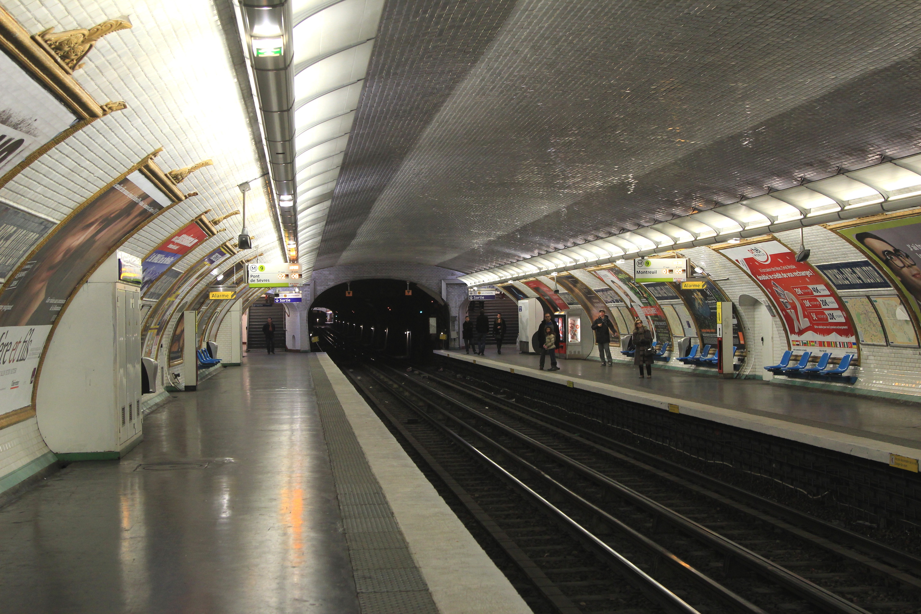 Quais de la station Michel-Ange - Molitor de la ligne 9 du métro parisien vu en direction de Mairie de Montreuil. On aperçoit au fond la station suivante (Michel-Ange - Auteuil).